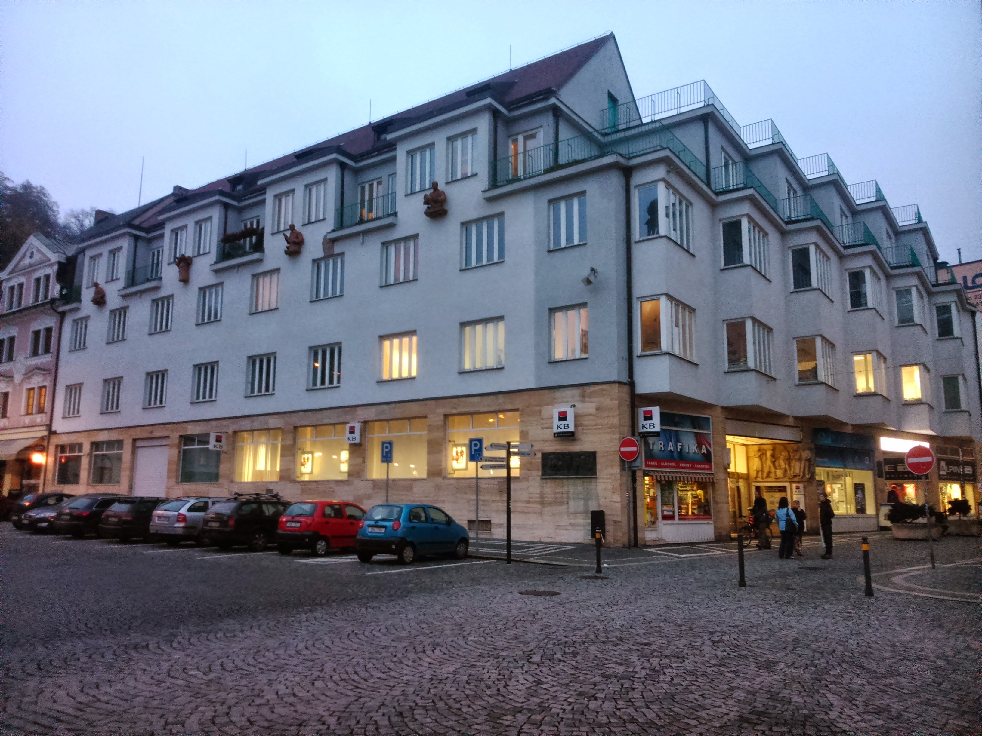 Městská spořitelna, náměstí v Náchodě, 1928-30